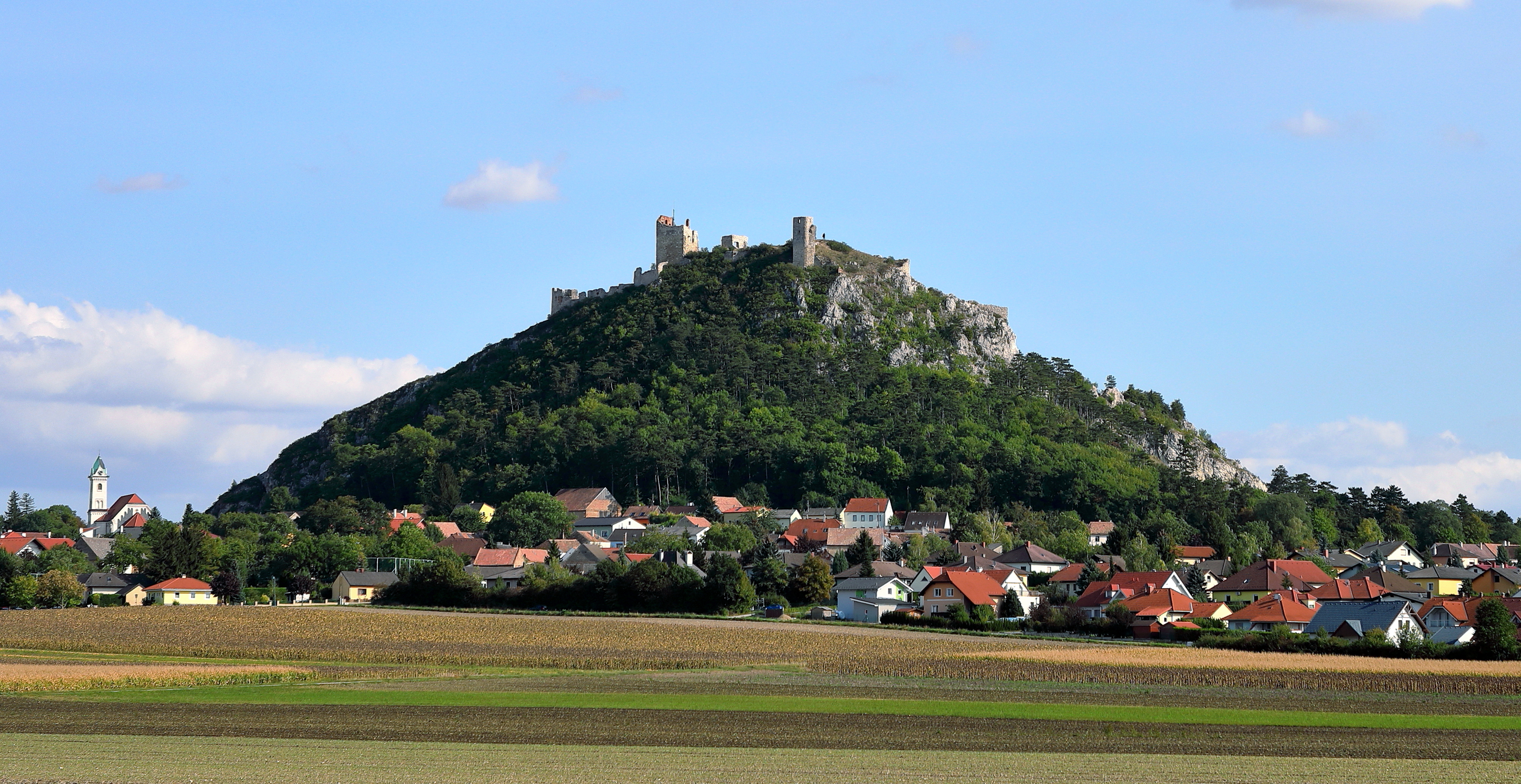 Nordwestansicht der niederösterreichischen Marktgemeinde Staatz. Im Zentrum der 332 m hohe Staatzer Berg, eine weithin sichtbare rund 100 Meter hohe Kalkklippe. Rund um dem Bergfuß das Dorf Staatz-Kautendorf mit der Pfarrkirche ganz links und auf dem Berg die Burgruine Staatz, eine ehemalige Burg, die am 24. April 1645 im Zuge des Dreißigjährigen Krieges von den Schweden zerstört wurde.